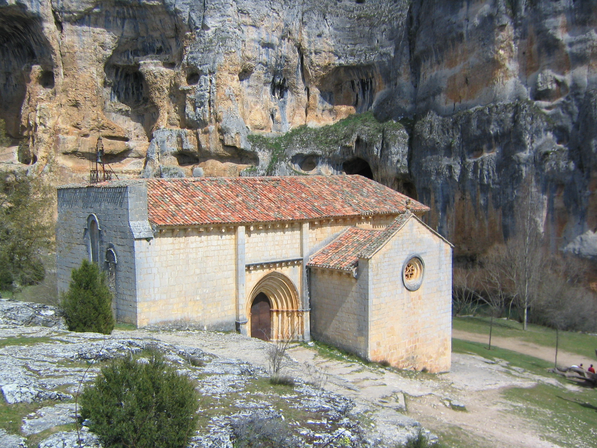 Cañon del río Lobos. Ermita de San Bartolomé en Ucero, Soria (Castilla León) (España).